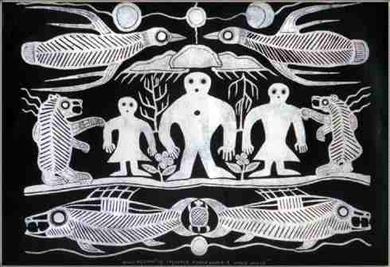 Ojibwe cosmos